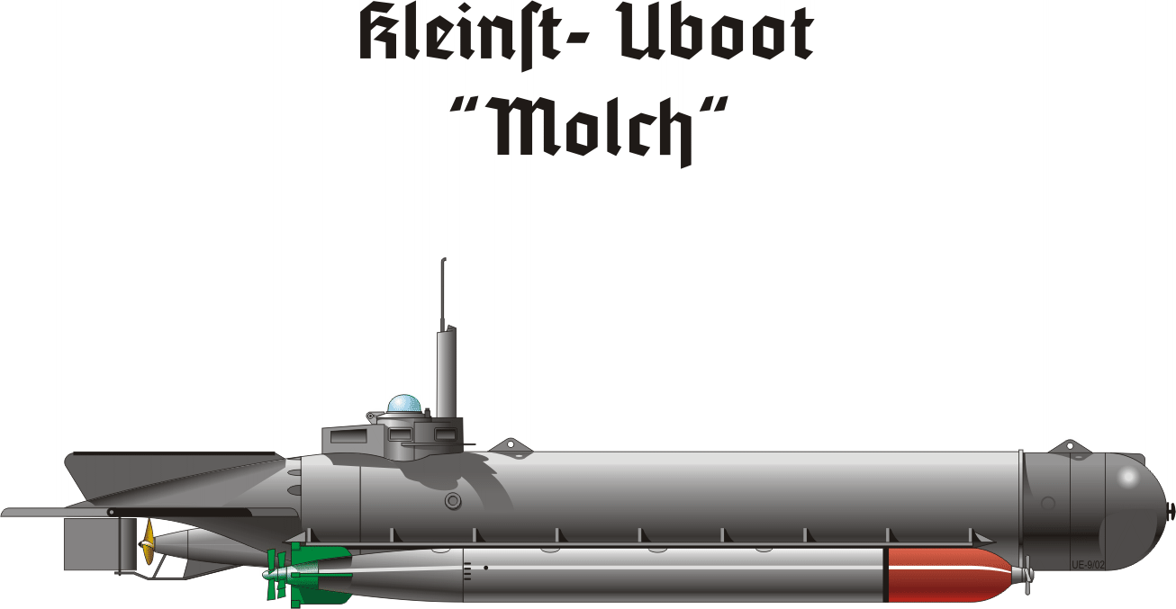 Zeichnung (Corel); Uwe Ernst